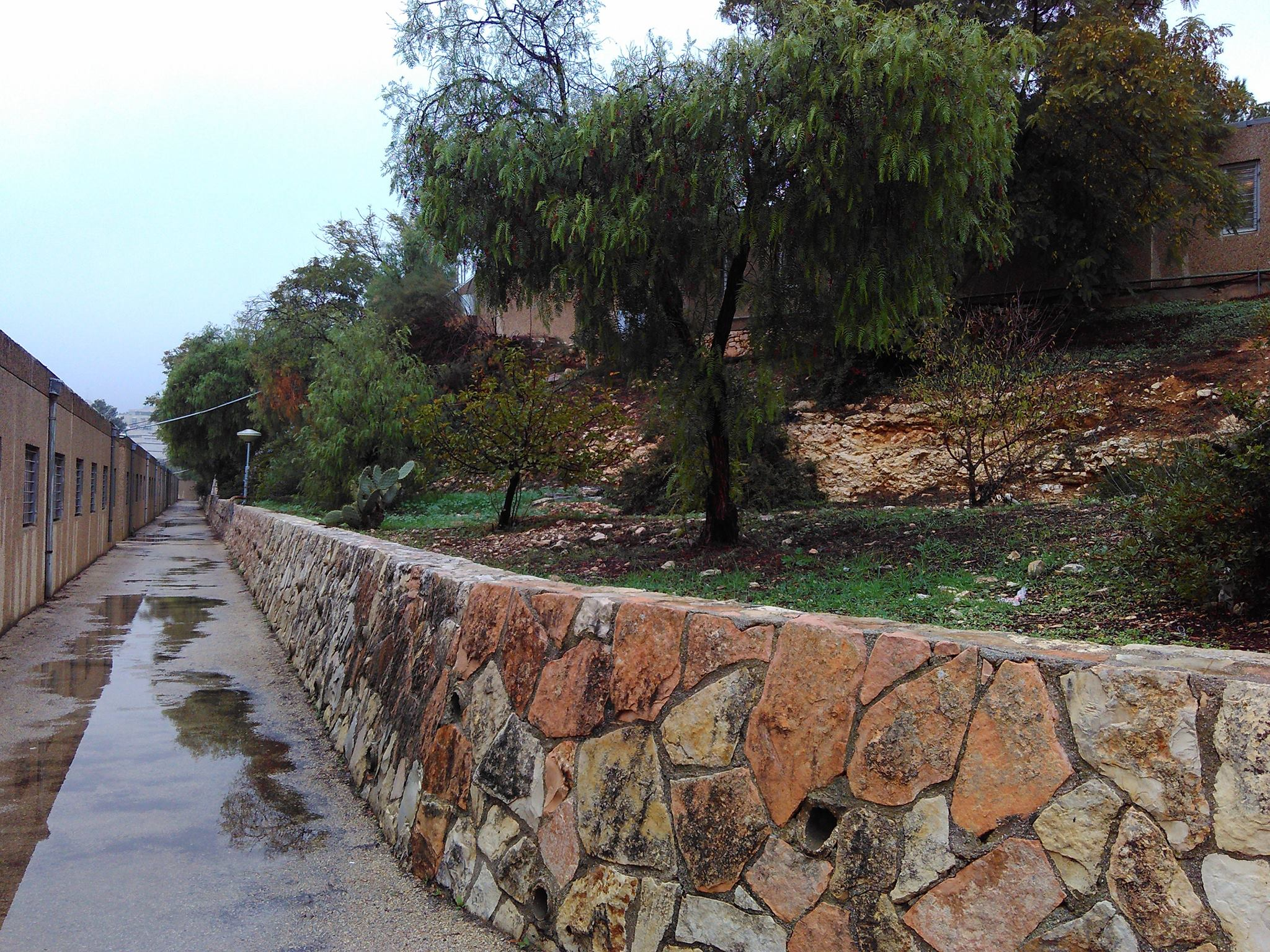 הארכיון המרכזי לתולדות העם היהודי